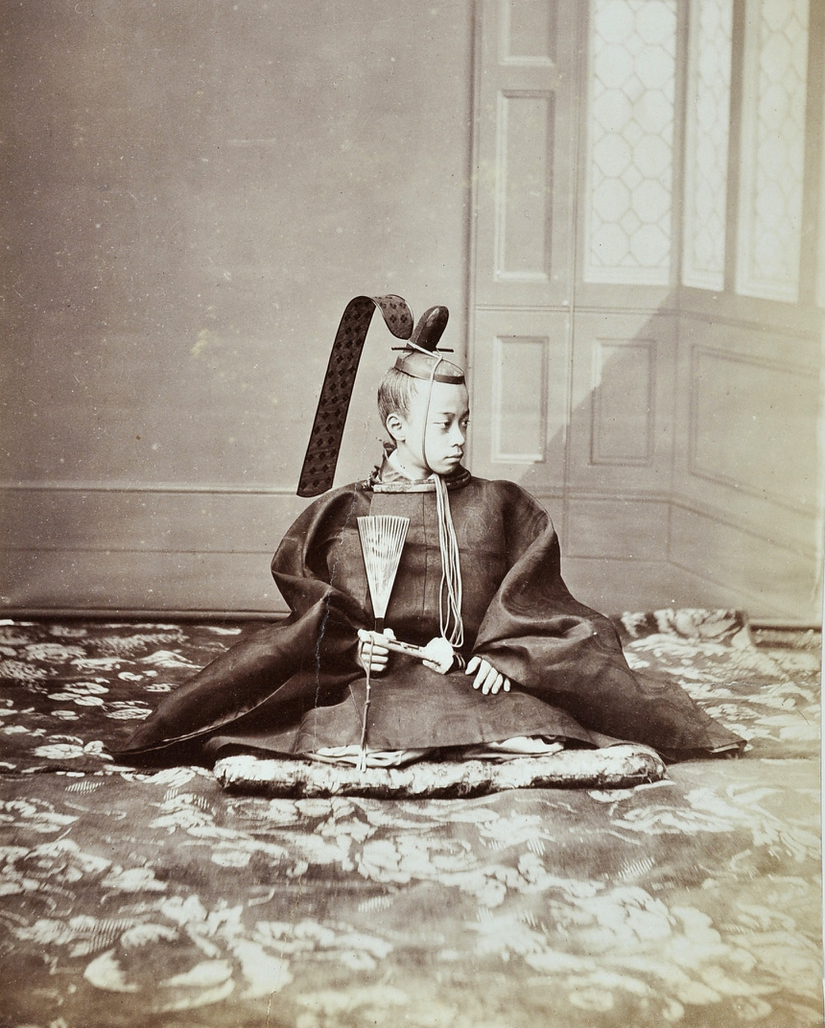 徳川昭武。Tokugawa Akitake.パリ万国博覧会に徳川慶喜の代理として出席した時の写真。14歳。